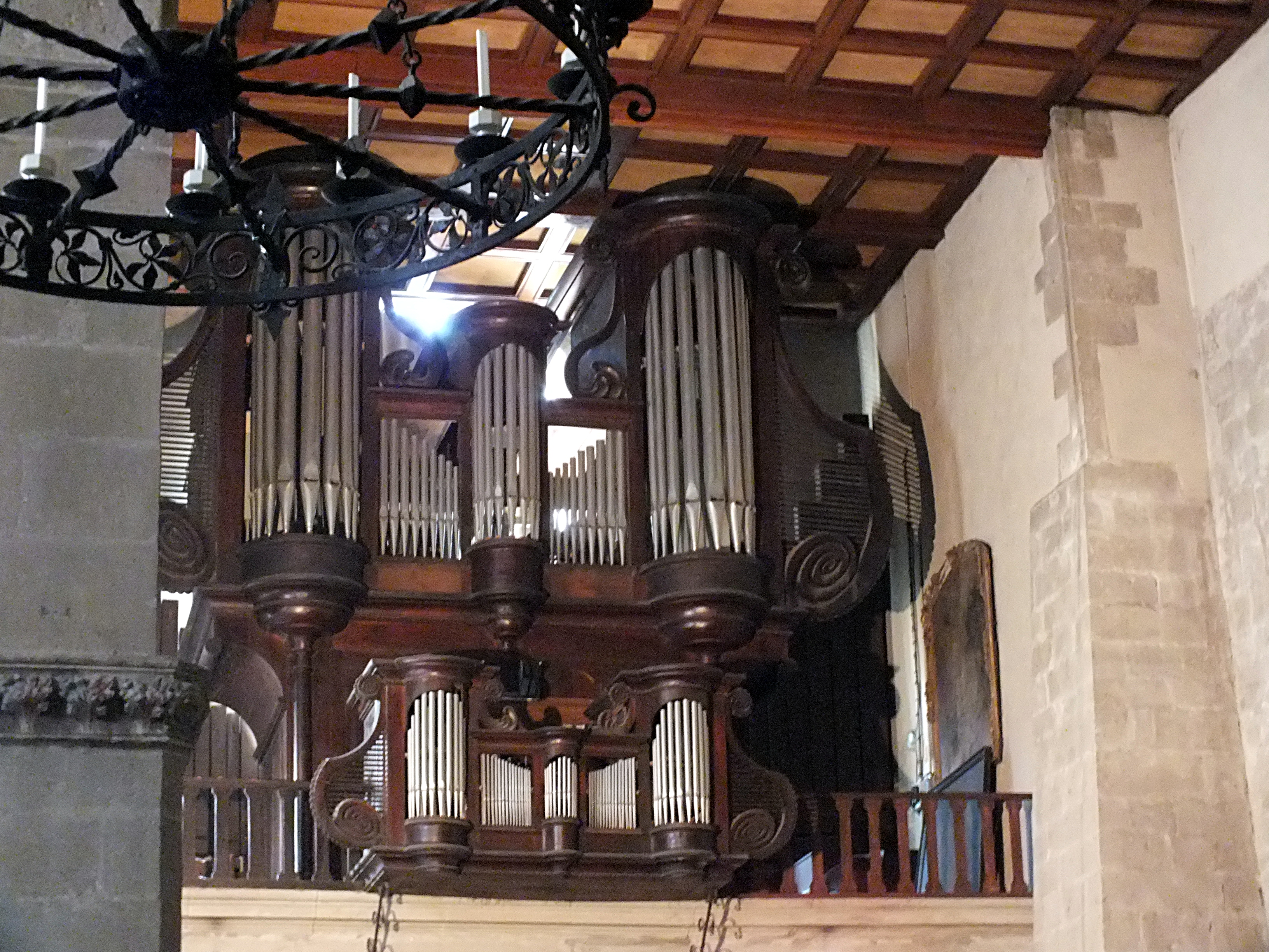 Tournon-sur-Rhône, Kirche St Julien (Heiliger Julianus); Orgel